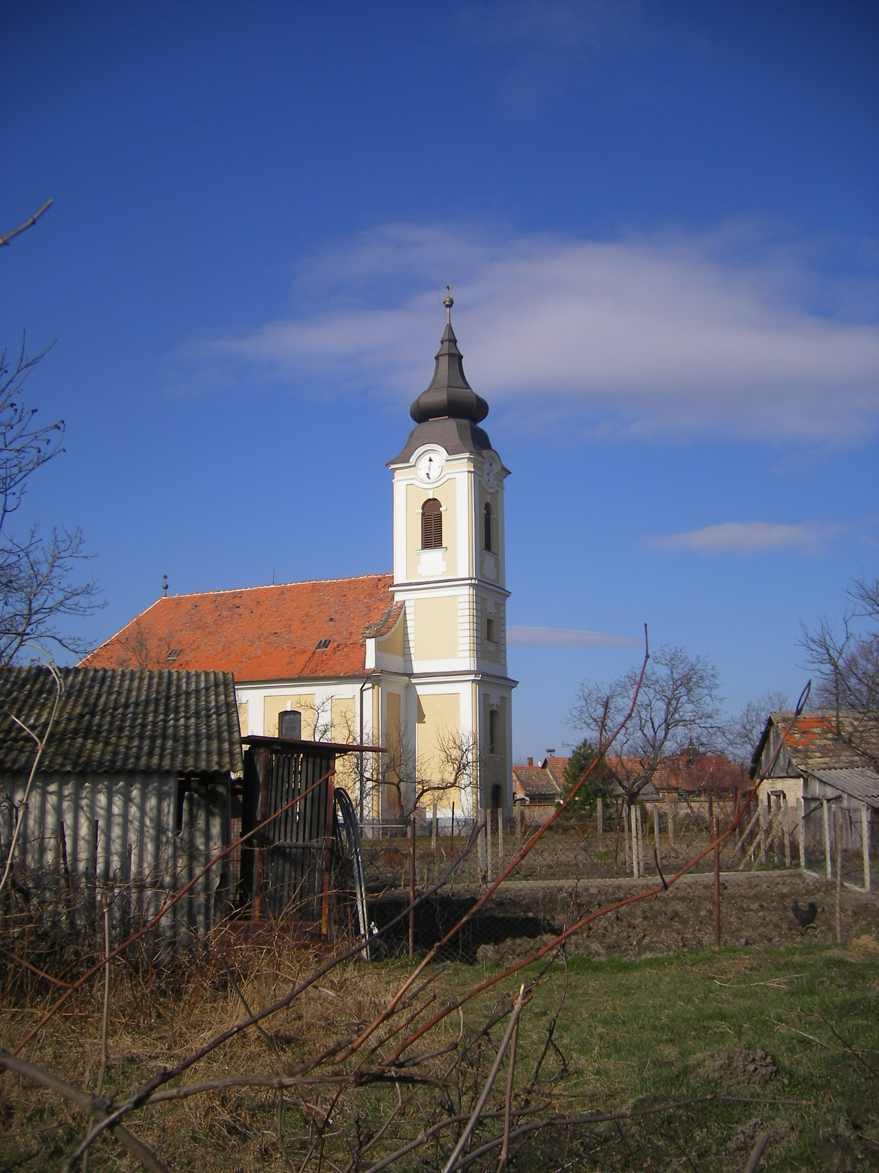 Okoličná na Ostrove - Ekel (okres Komárno), ref. kostol, református templom